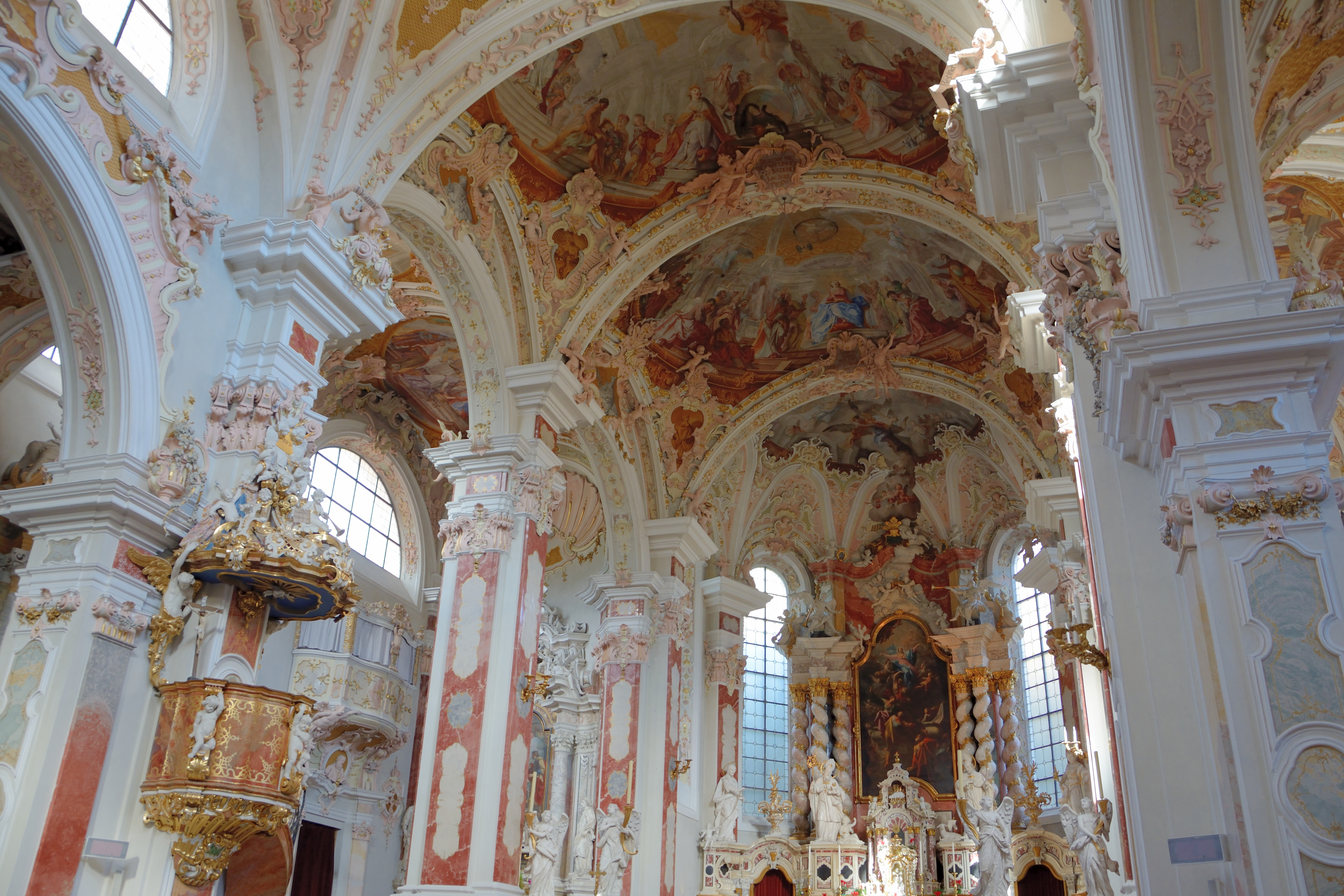 Mittelschiff der Stiftskirche Unserer Lieben Frau in Neustift bei Brixen